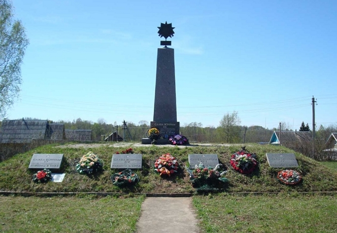 Расположен на месте разрушенной немцами церкви св. Ильи Пророка